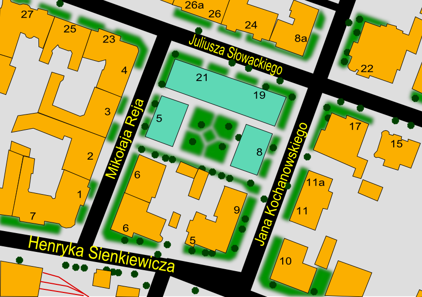 Mapa lokalizacyjna Domu Tramwajarza w Poznaniu